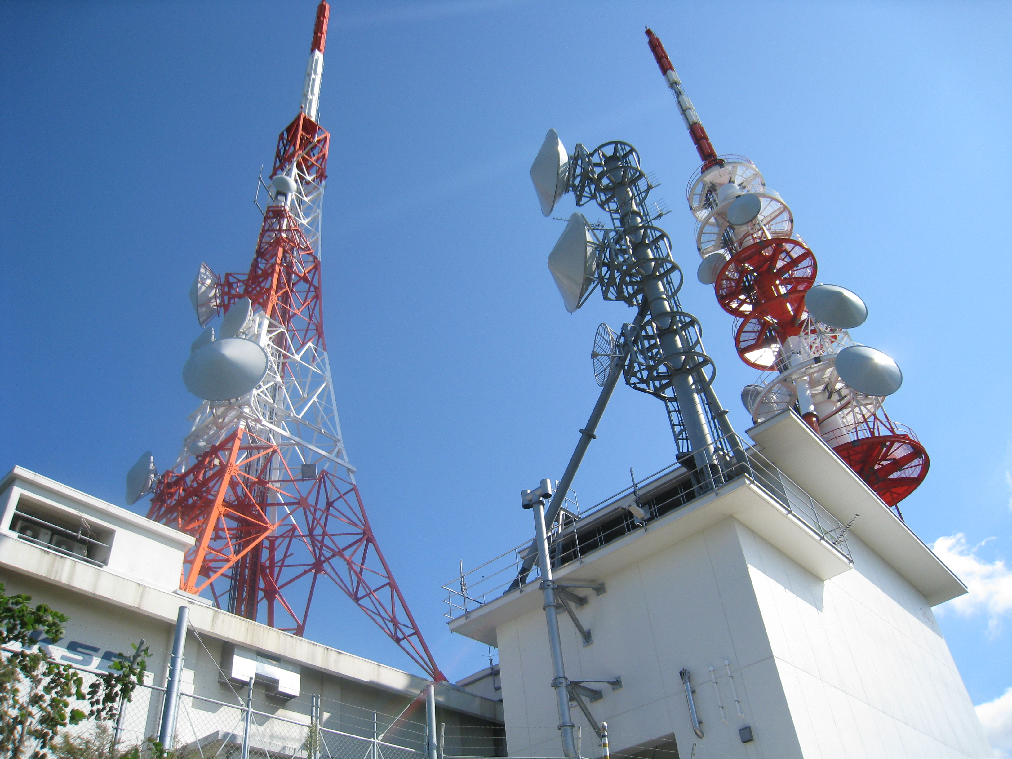 South radio towers on Mt. Maedayama in Takamatsu, Kagawa Japan